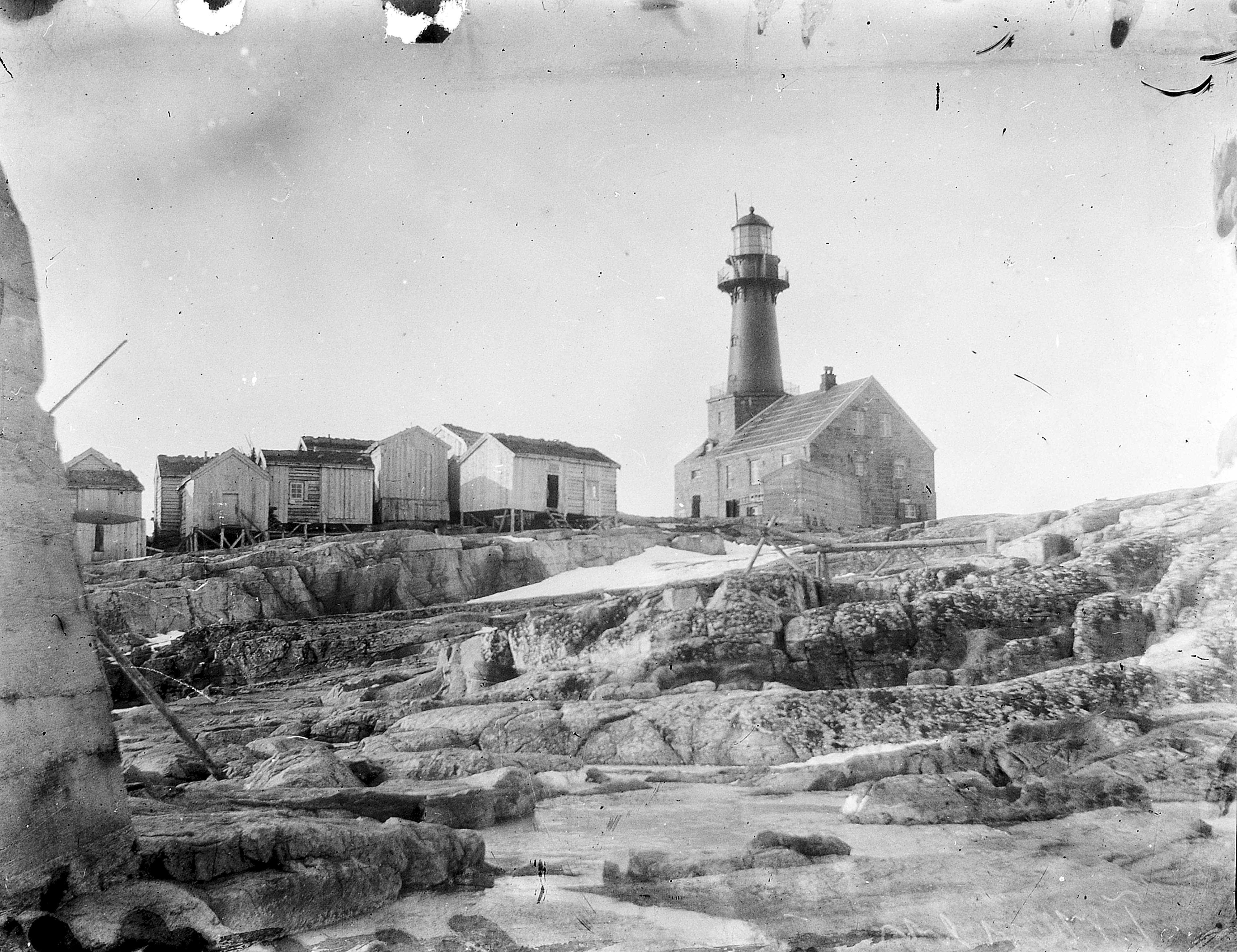 Bildet er hentet fra Arkivverket. Træna, Træna Arkivinstitusjon : Riksarkivet Arkivnavn : Fyrdirektoratet Sted : Norge, , , Emneord: Fyr, Kyst Avbildet